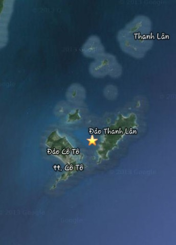 Ảnh chụp từ vệ tinh